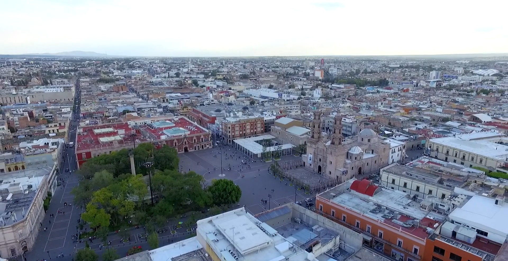 Plaza de la Patria centro histórico de Aguascalientes, México